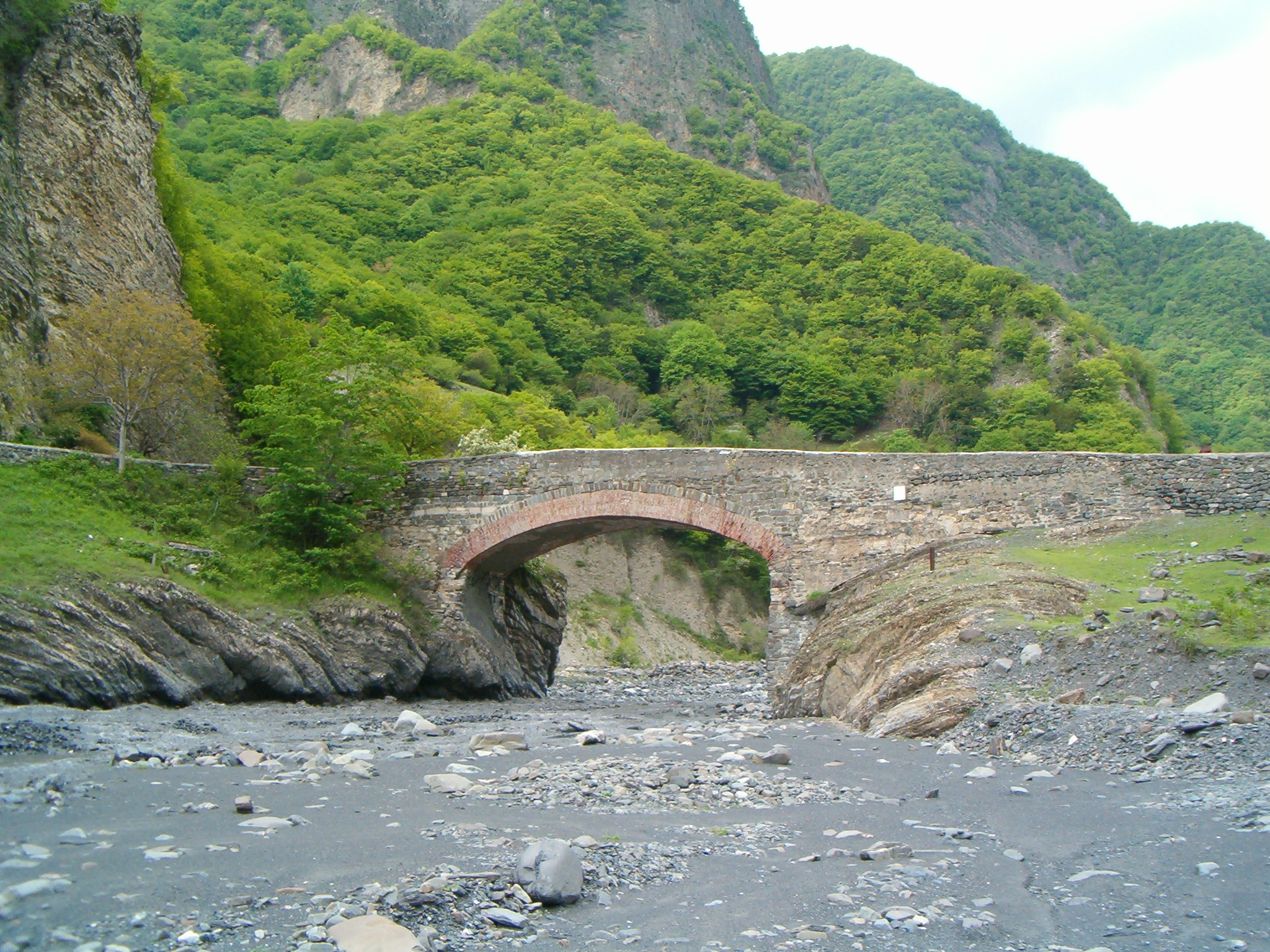 Ulu körpü